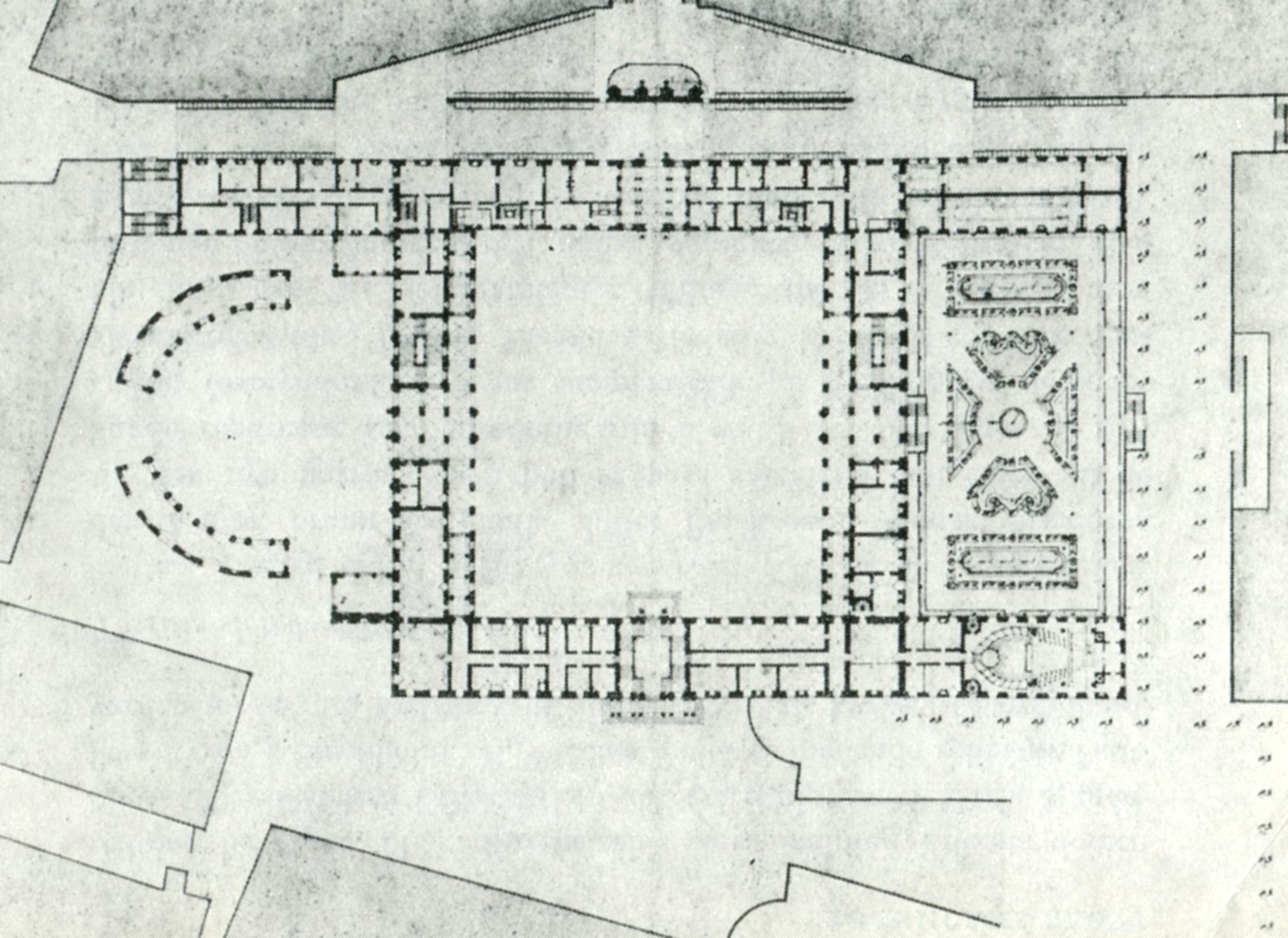 Stockholms slott, Nicodemus Tessins ritning från 1697